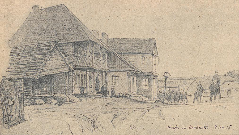 Беларуская (тарашкевіца): Мусьнікі (Muśniki), неідэнтыфікаваная вуліца